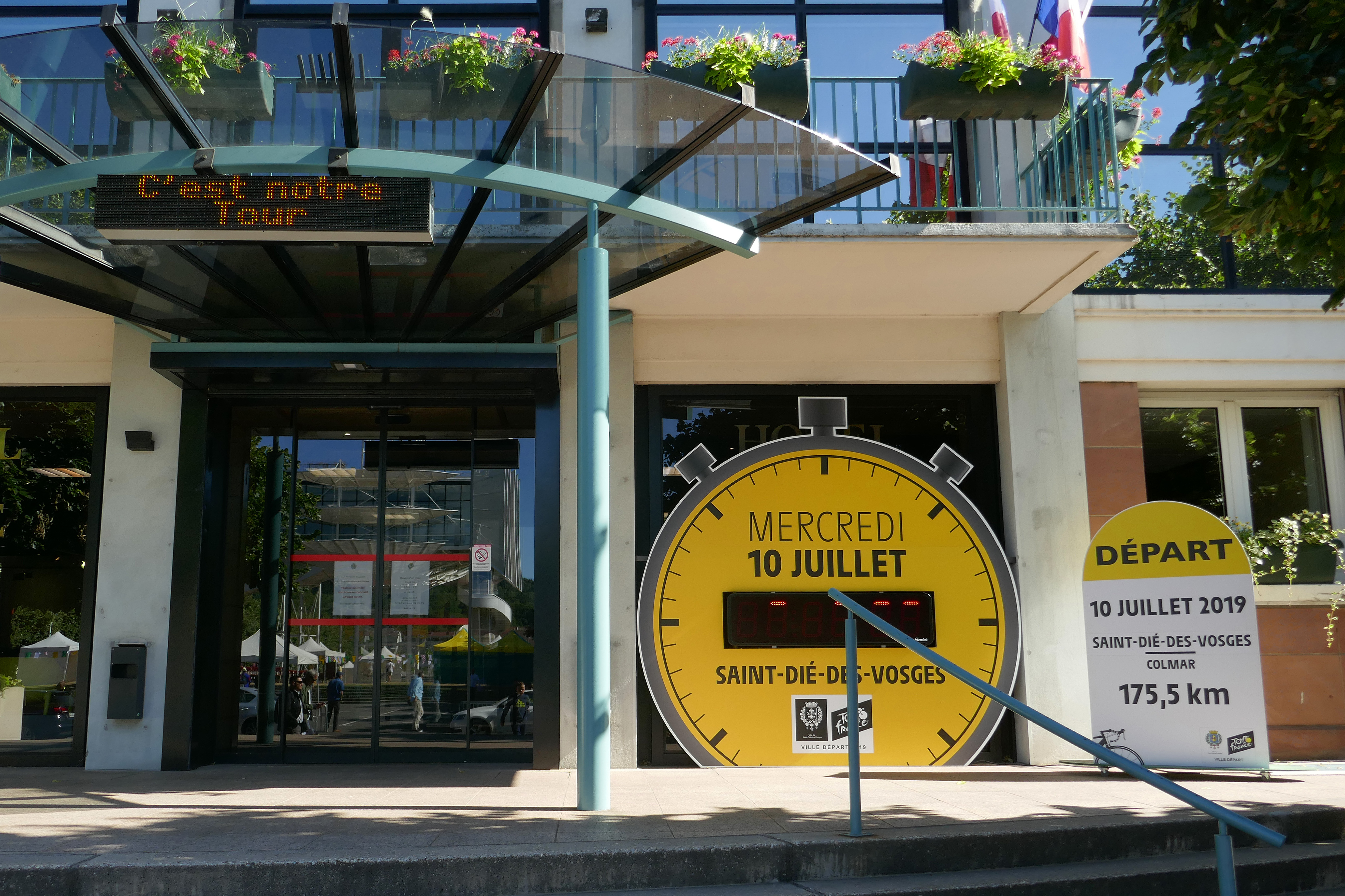 Tour de France cycliste 2019 à Saint-Dié-des-Vosges. Etape 5.